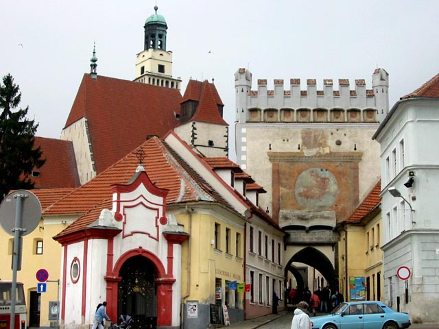 Bildoj de ĉeĥaj urboj Prachatice